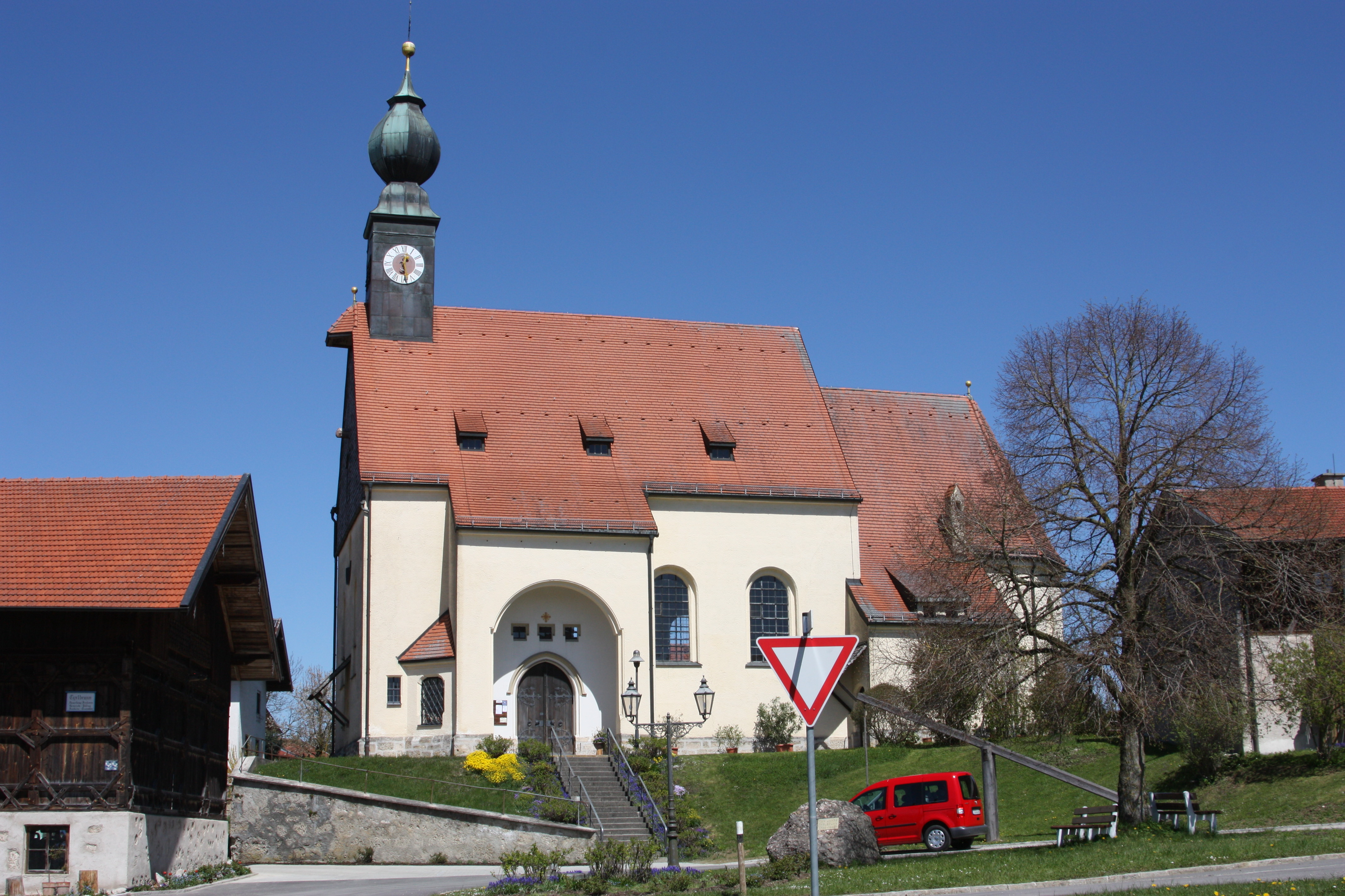 Palling OT TyrlbrunnKath. Filialkirche St. Michael, spätgotischer Chor, wohl Mitte 15. Jh., Langhaus 1905 neu errichtet nach Plänen von Max Ostenrieder; mit Ausstattung. Aktennummer: D-1-89-134-100